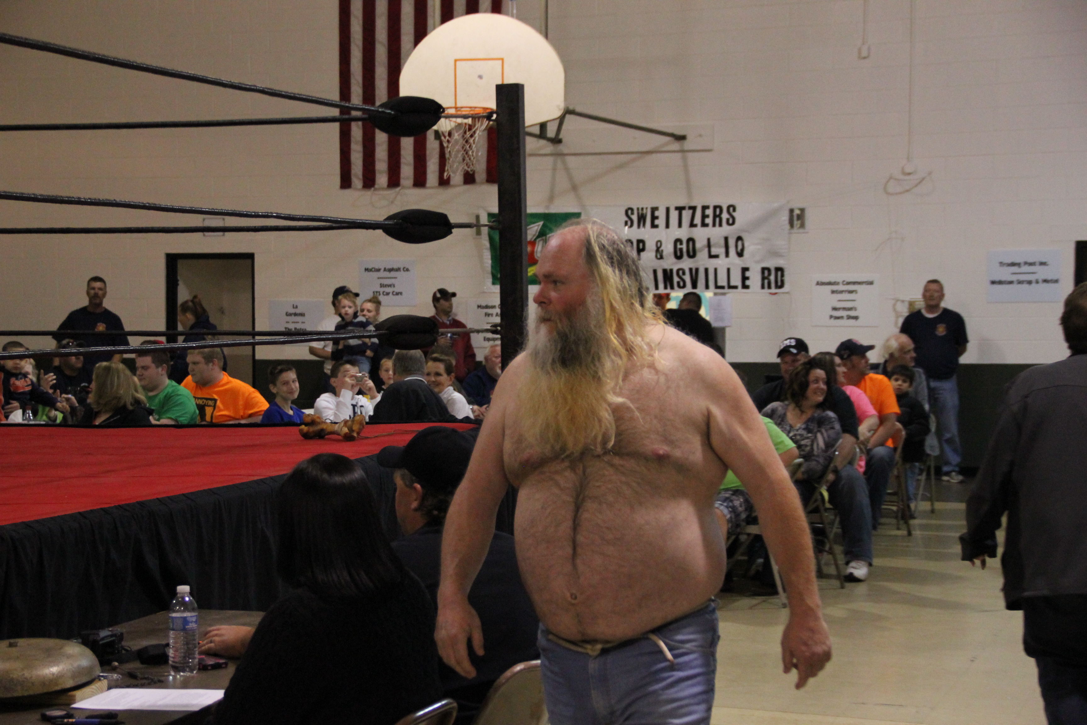 2013-04-21T00:30:15.510